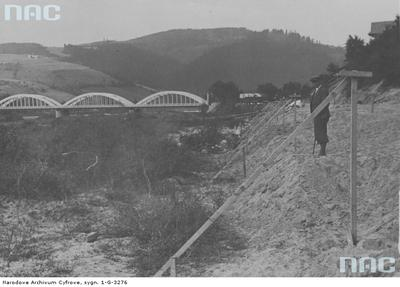 Zdjęcie mostu im. Józefa Piłsudskiego od strony budowanej drogi do Szczawnicy